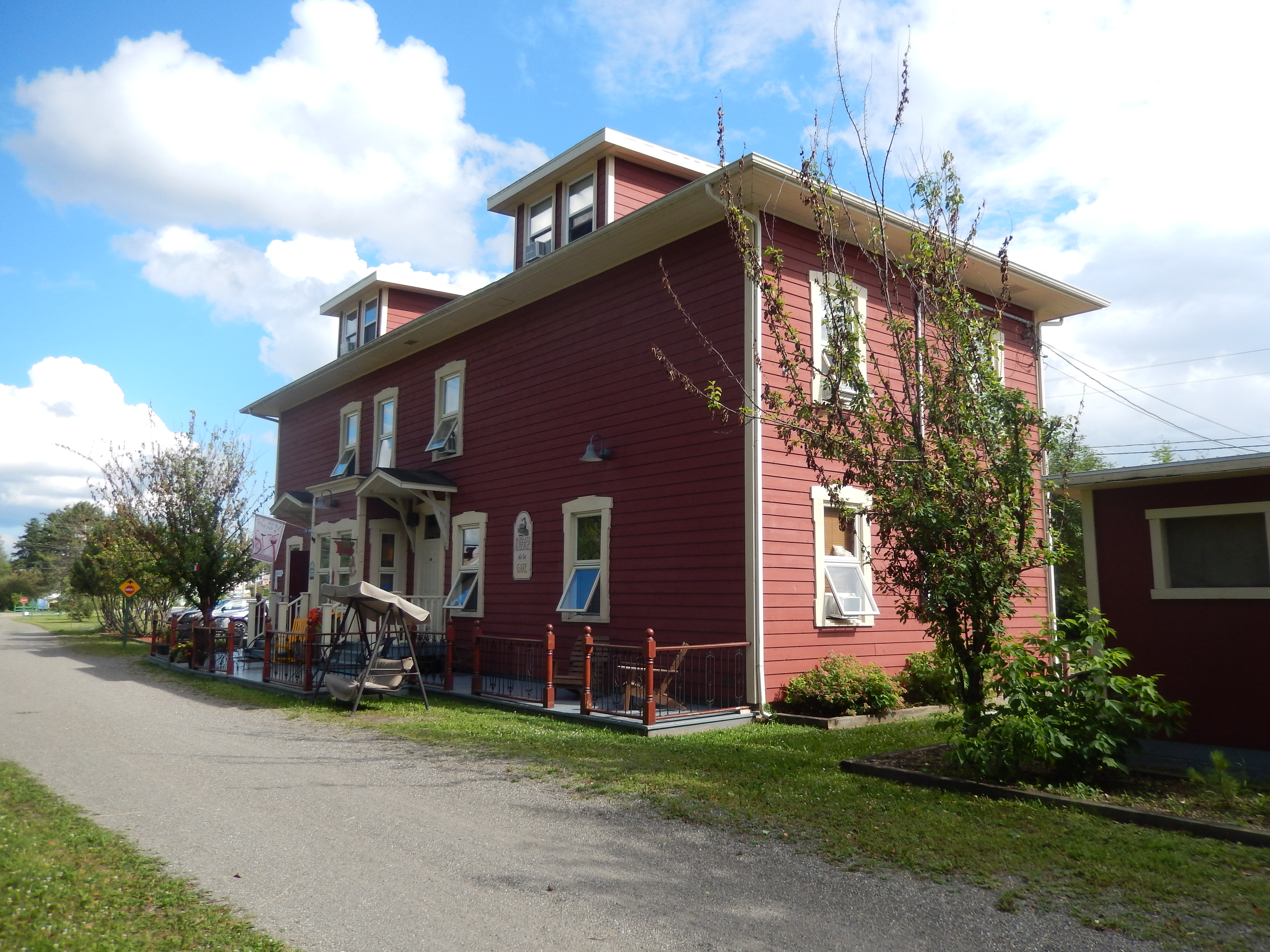 Gare de Cabano en juilet 2016.